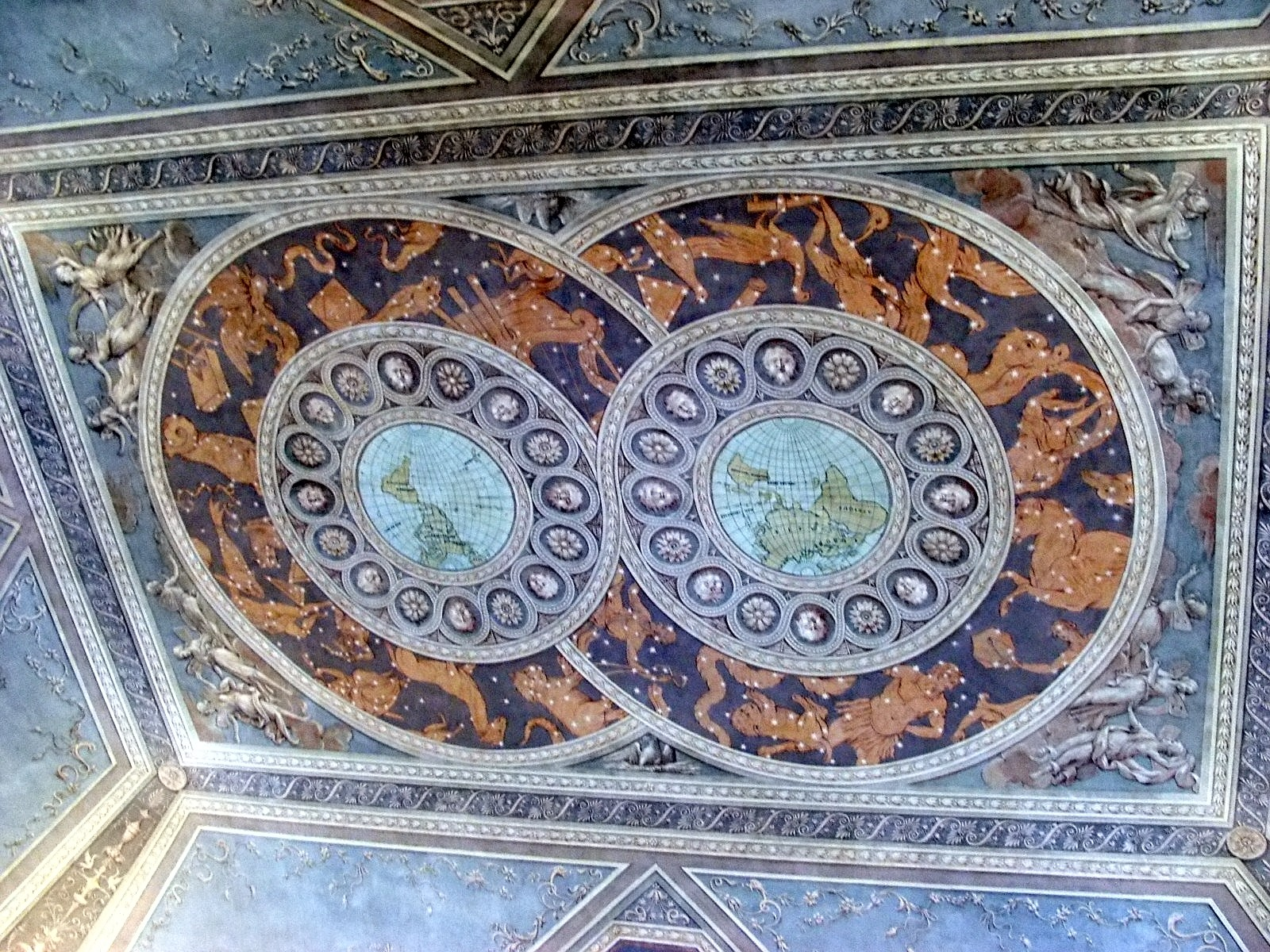 Immagine dalla Reggia di Caserta, Caserta, Campania, Italia. Affresco nella prima sala della Biblioteca. Soggetto: Gli emisferi con i segni zodiacali e le costellazioni; Epoca: seconda metà del XVIII secolo; Autori: Carlo Vanvitelli e Filippo Pascale.